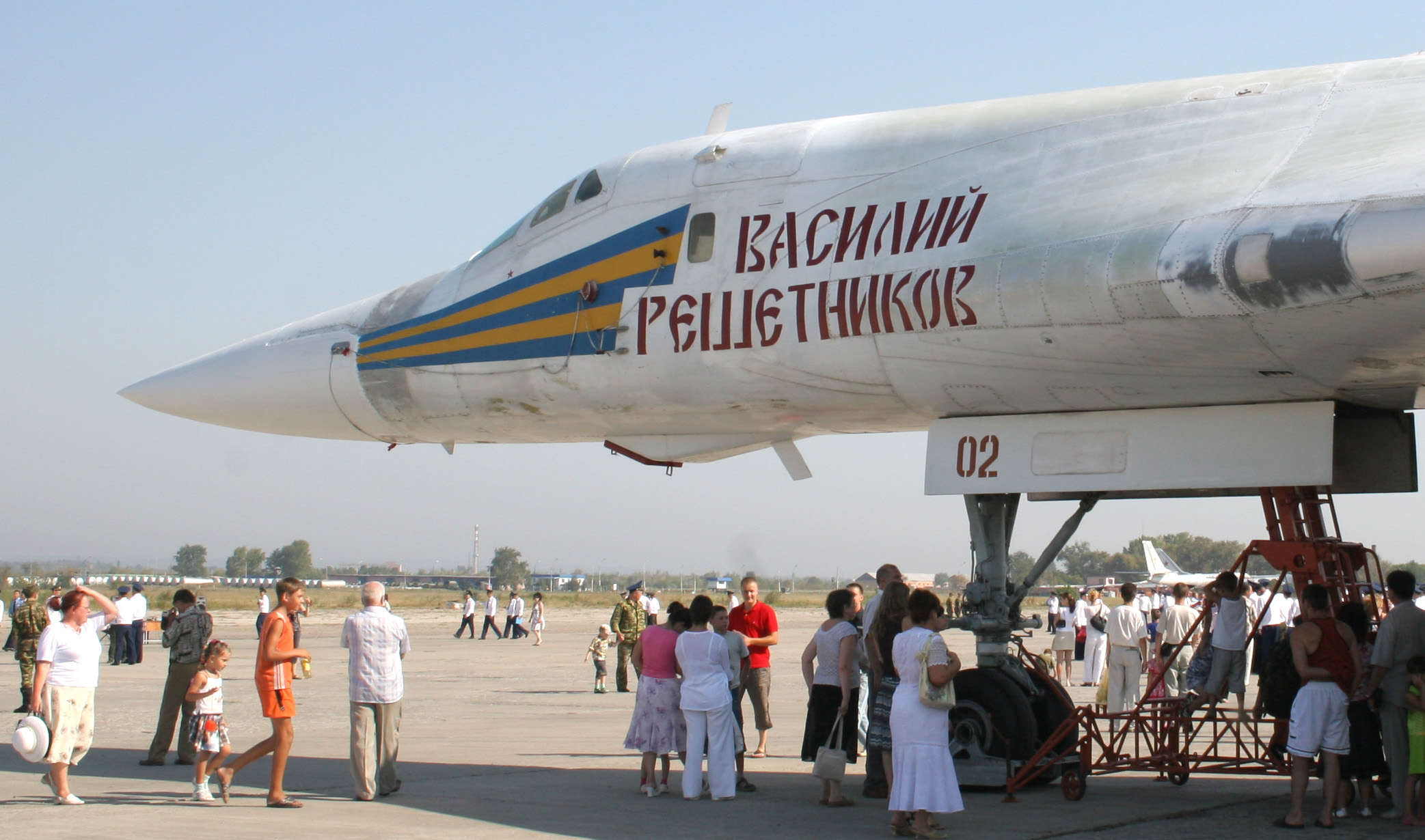 Самолёт Ту-160 бортовой номер 02 «Василий Решетников» на авиабазе Энгельс